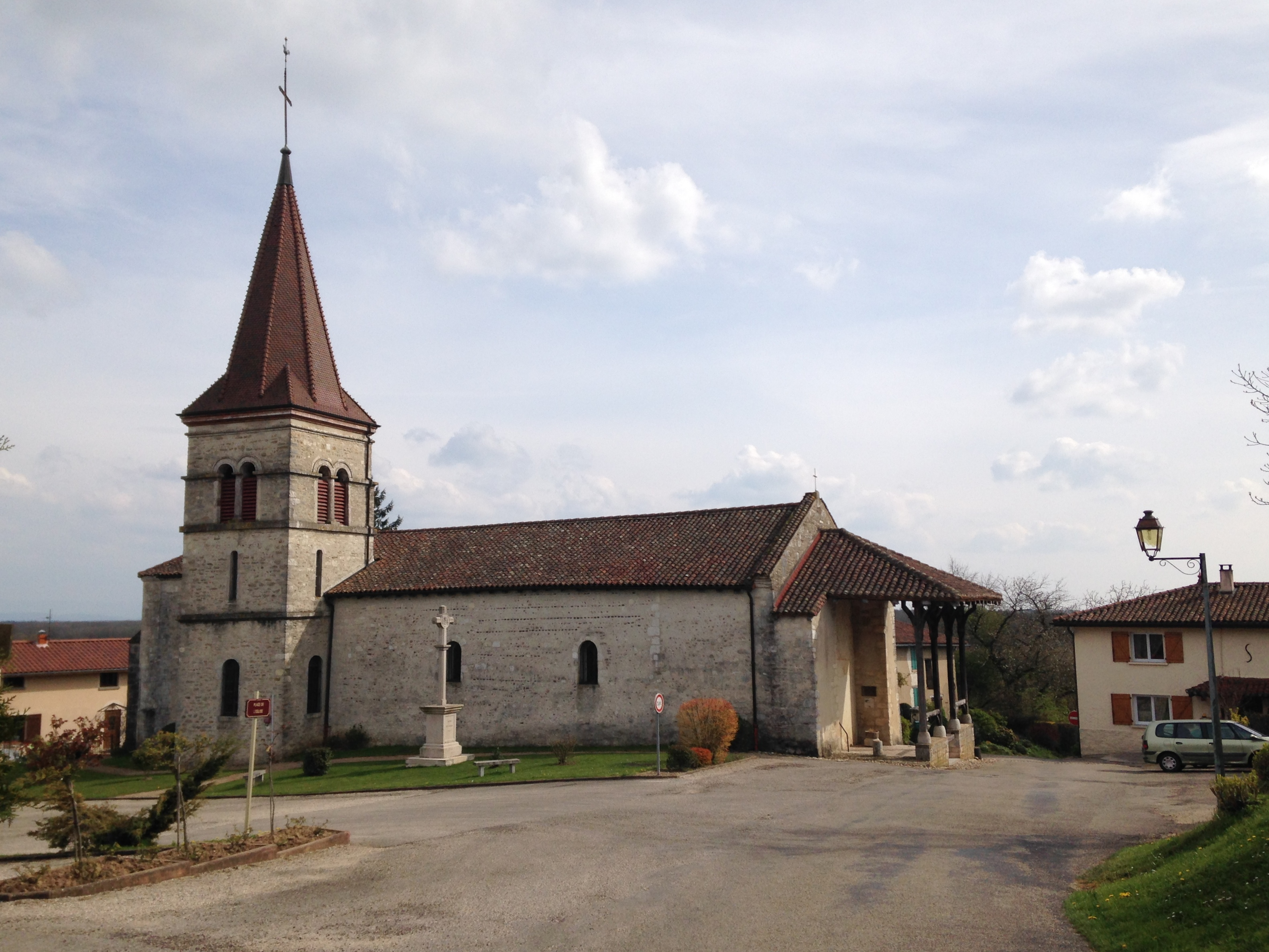 Église de Chaveyriat datant du XXIe siècle